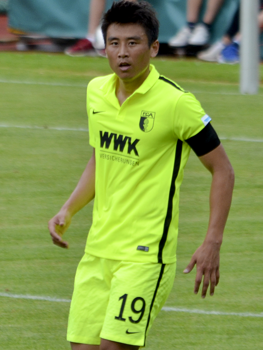 Koo Ja-cheol, südkoreanischer Fußballspieler (2016)